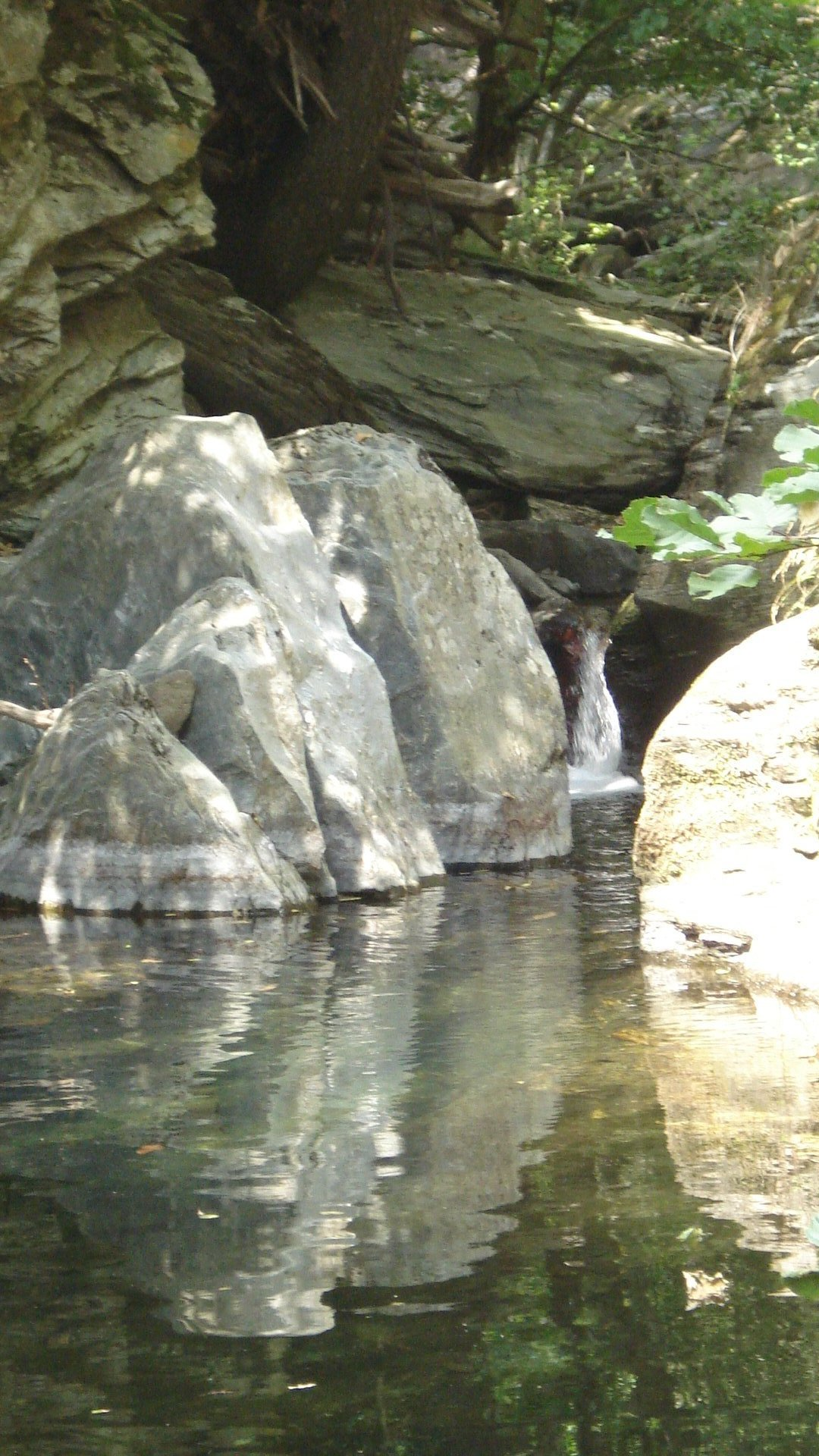 ruisseau affluent du gardon de Saint-Germain-de-Calberte